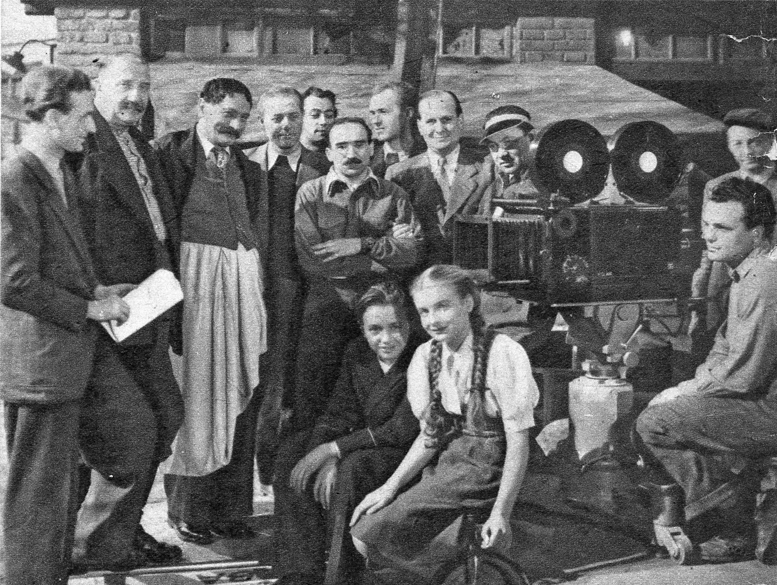 Aktorzy filmu "Ulica Graniczna"